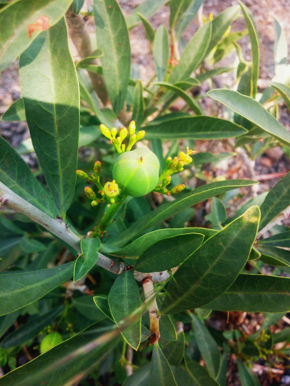 Jatropha variegata هكذا تبدو ثمره نبته ال قبل نضوجها